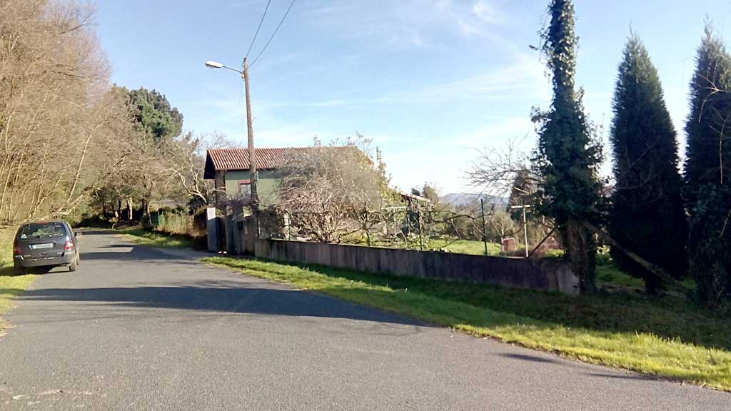 Vista do Freixido, Sedes